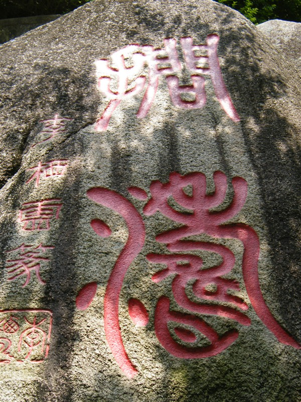 青云岩石刻之一